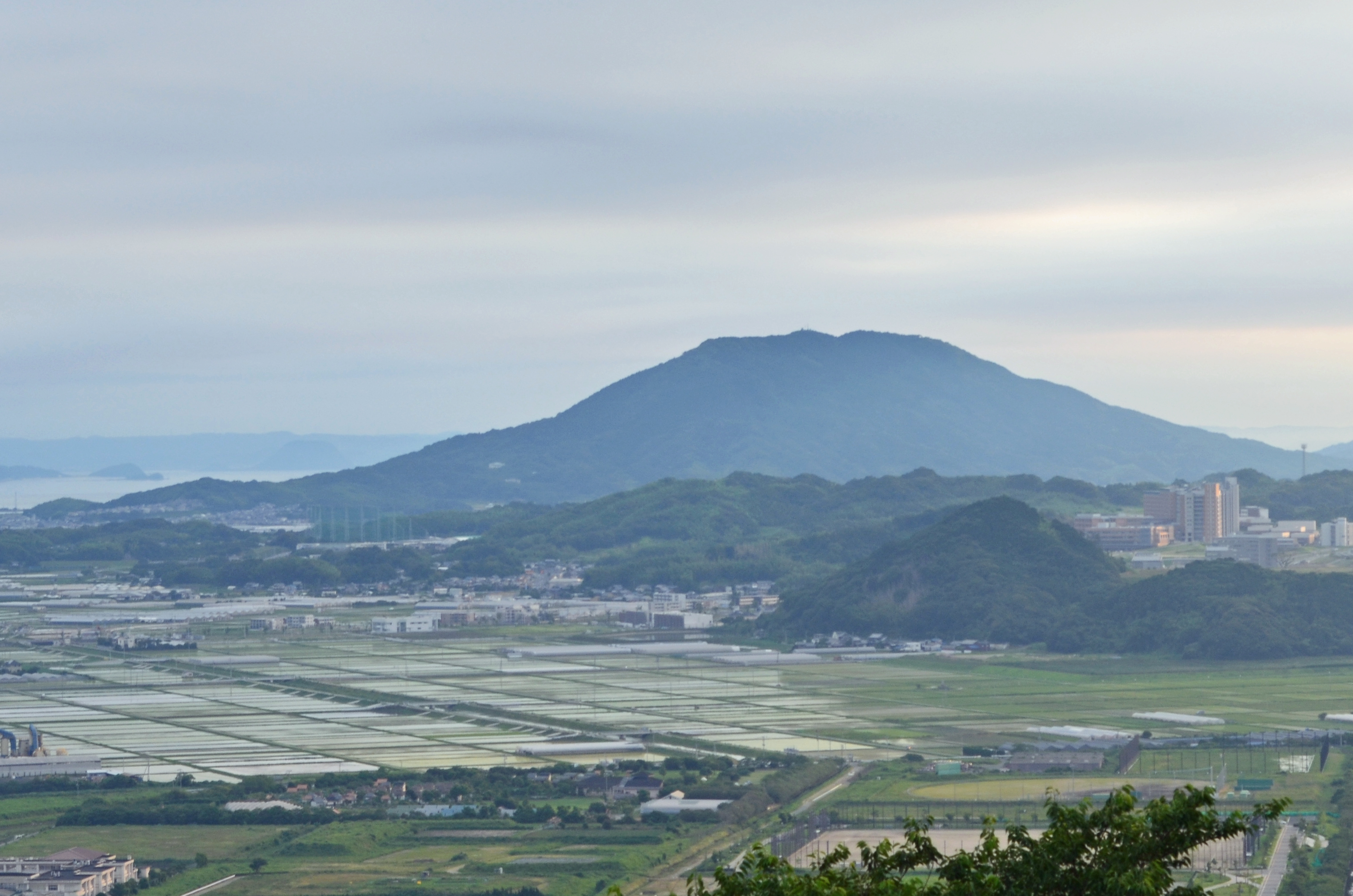 毘沙門山(福岡市西区)より望む可也山。